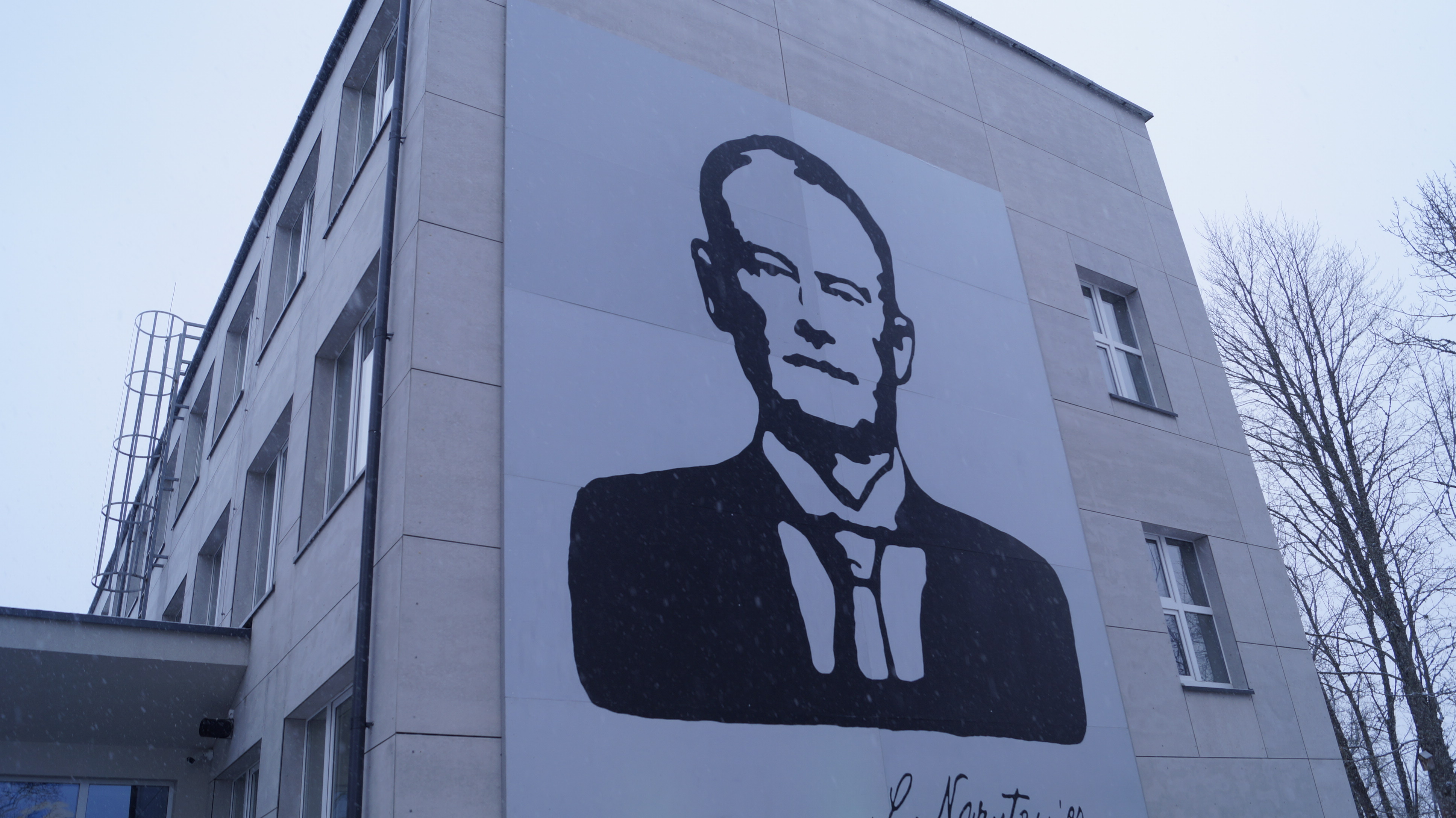 S. Narutavičiaus portretas ant Alsėdžių S. Narutavičiaus gimnazijos sienos